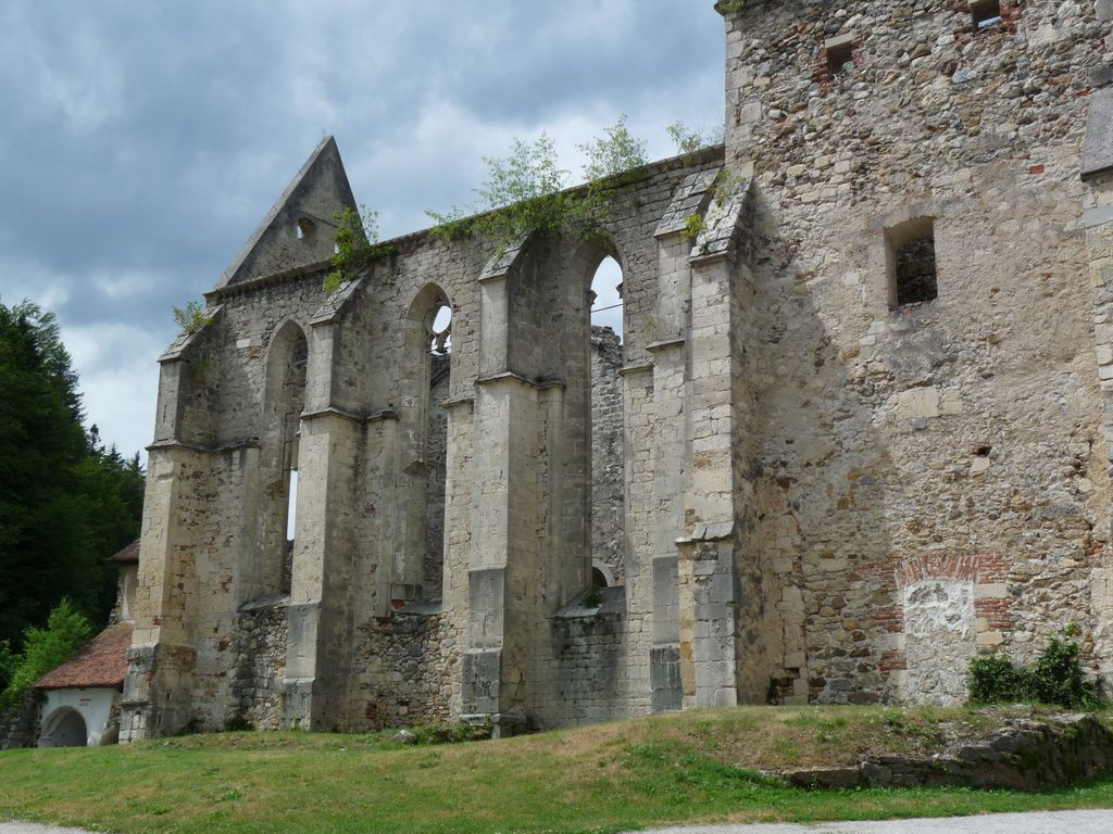 Kartuzija Žiče